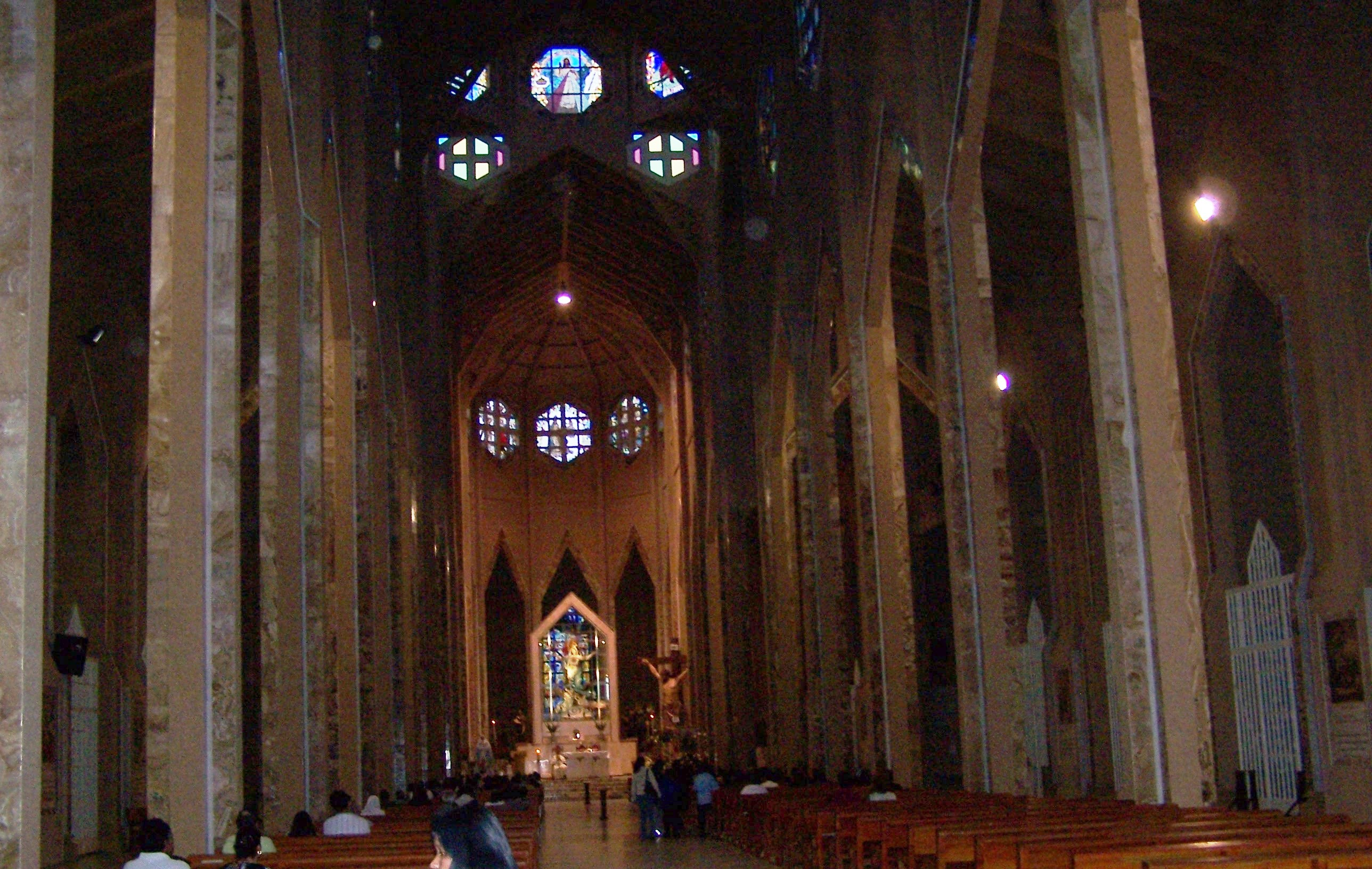 Vista del interior de la Catedral de Santa María de la Asunción